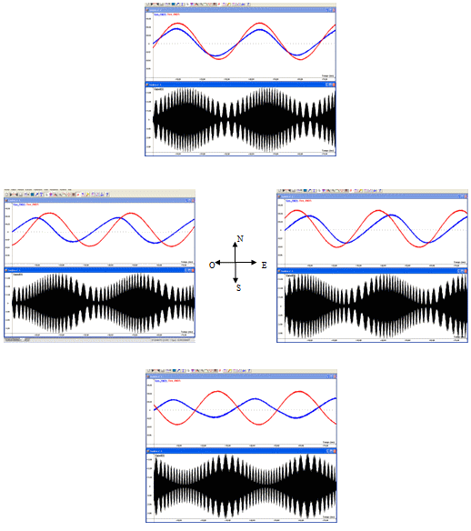 Comparatif des différents signaux reçus d'un VOR en fonction de la position du récepteur